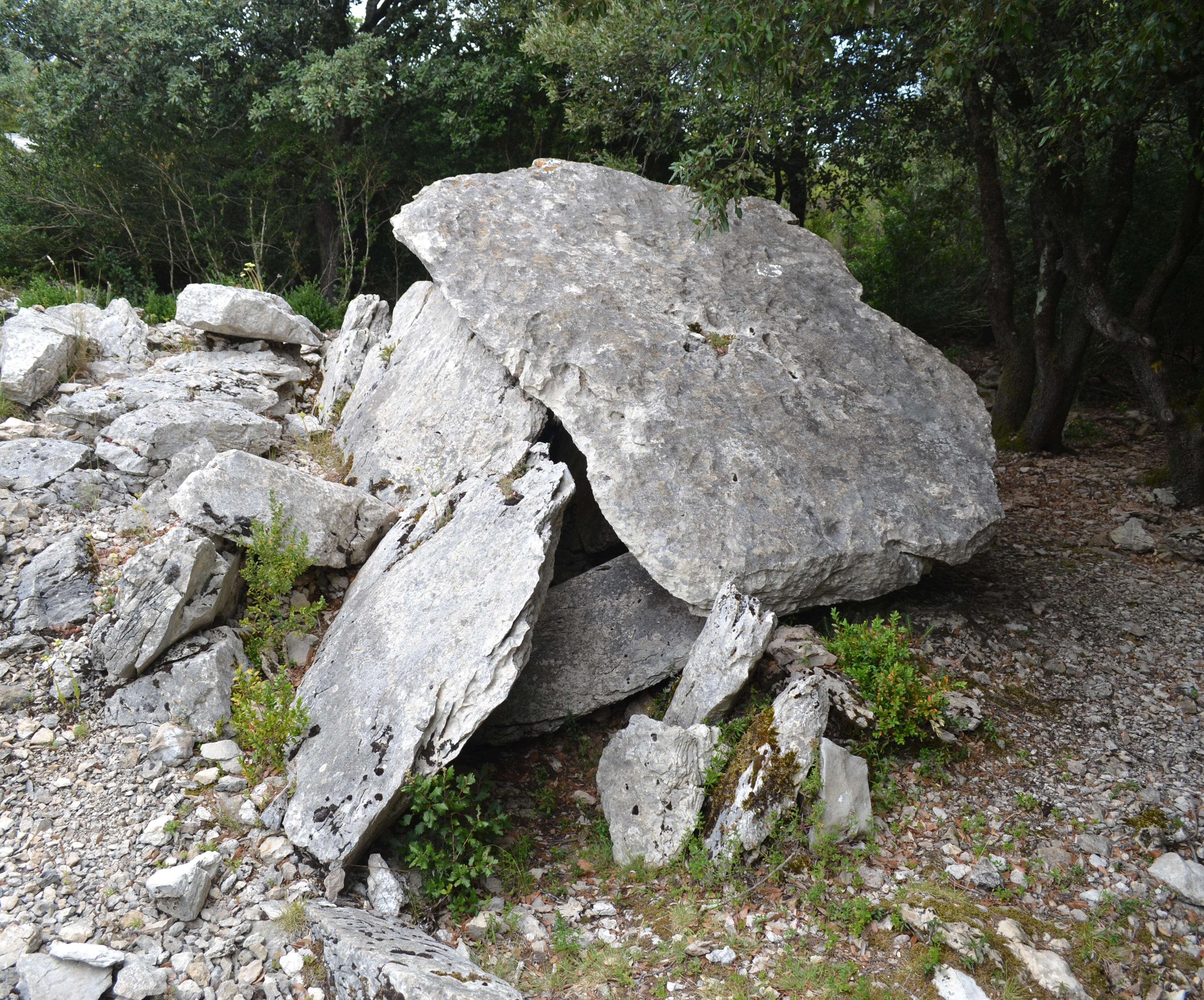 Dolmen n°1 de l'Arco del Pech (ou du Col de Guilhem) à Cubières-sur-Cinoble (11).